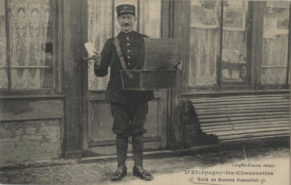 Carte postale de l'éditeur Longfier-Chartié, titrée: Etrépagny-les-Chaussettes" (1)